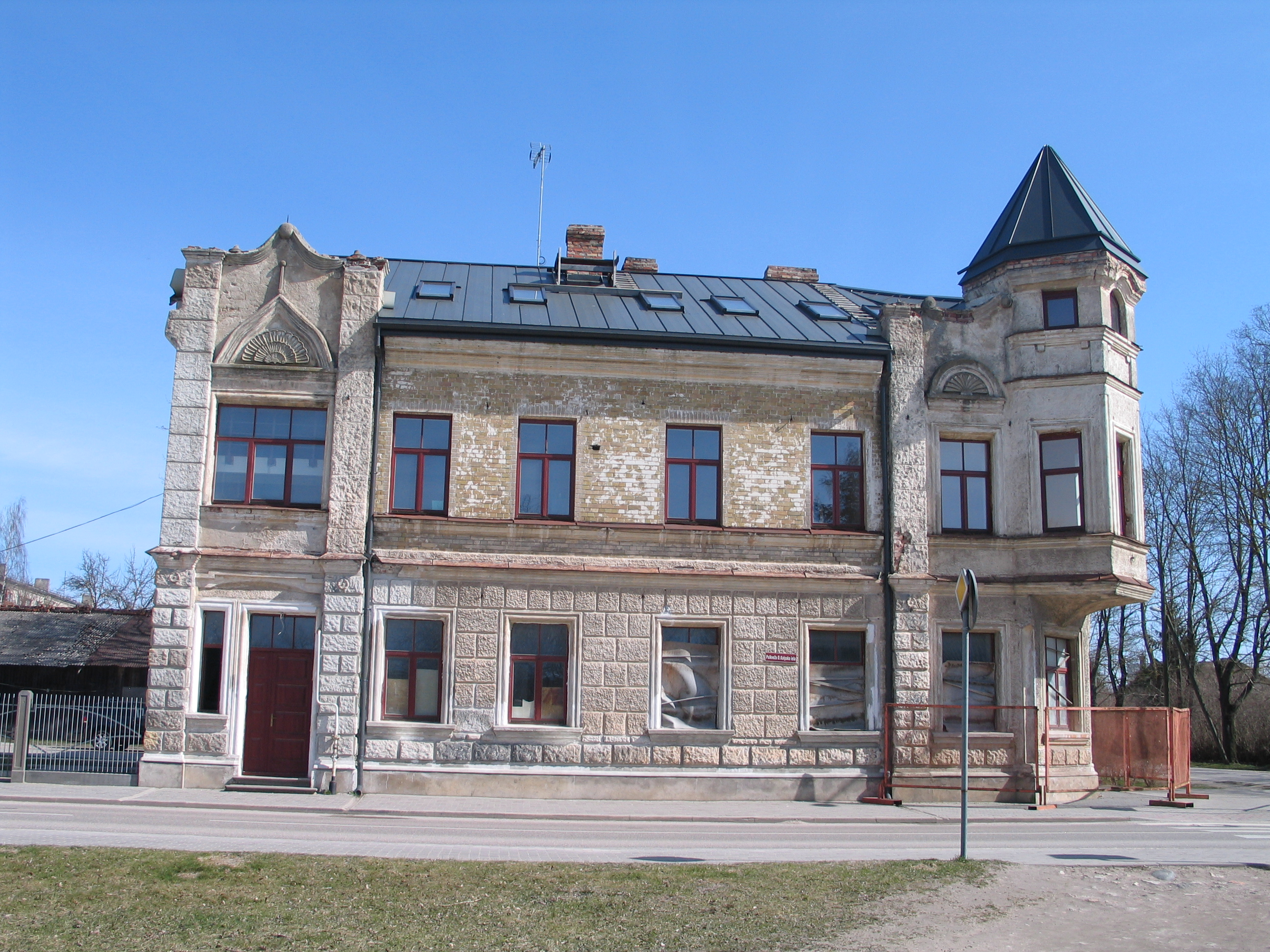 Dzīvojamā ēka, Jelgava, Vaļņu iela 18